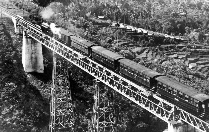 Repronegatief. Een trein rijdt over de spoorbrug Tjilame in Priangan, West-Java